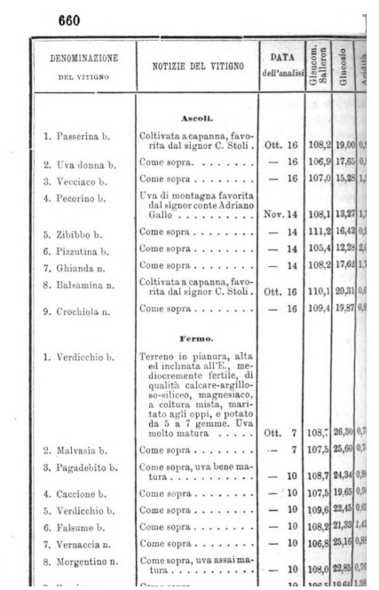 Bullettino Ampelografico, Fascicolo VIII, Ministero Agricoltura, Industria e Commercio, Divisione Agricoltura, Stampato dalla Tipografia Eredi Botta, Roma, anno 1876, pagina 660.